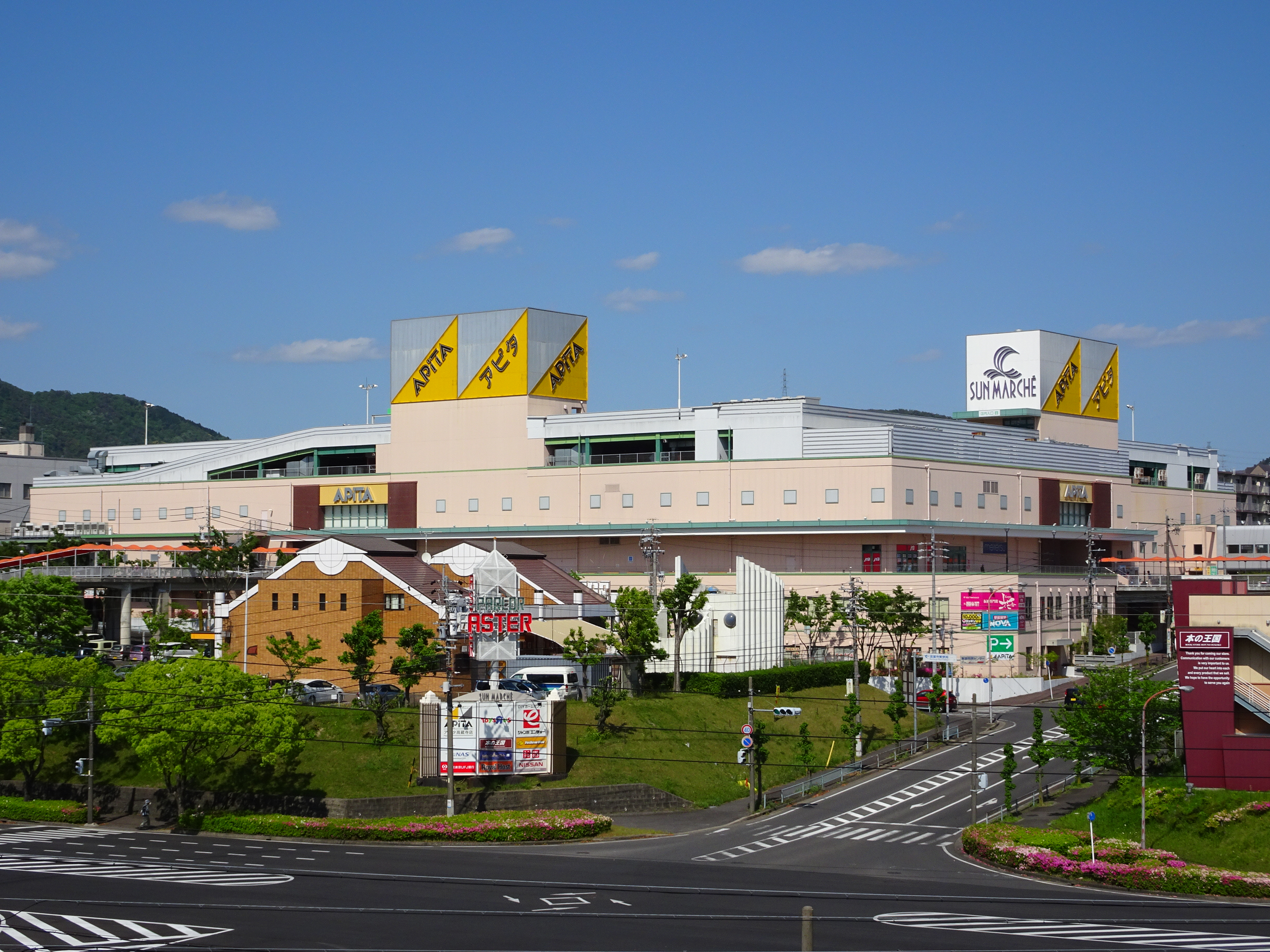 サンマルシェ アピタ館